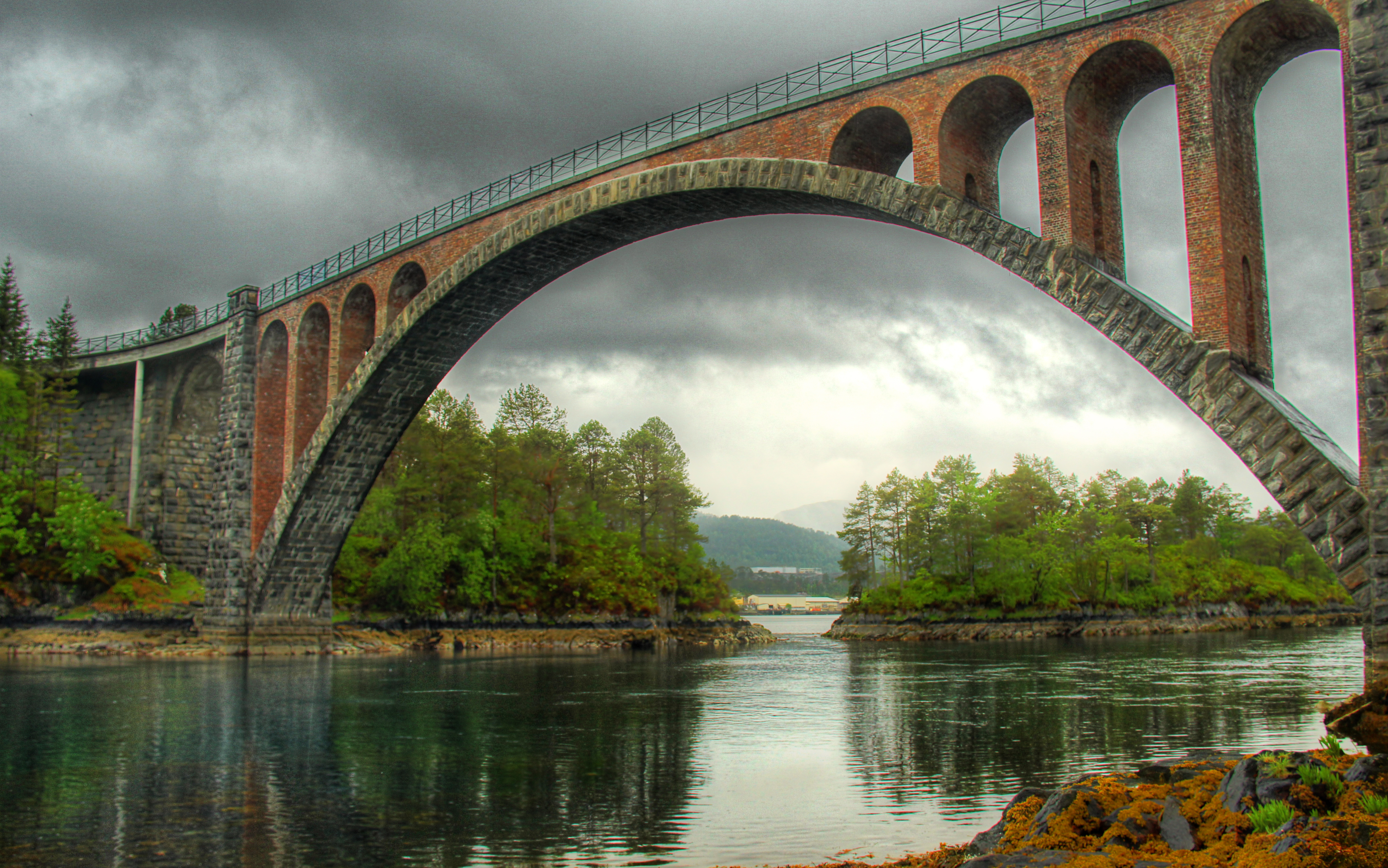 Skodjebruene i Skodje kommune i Møre og Romsdal fylke